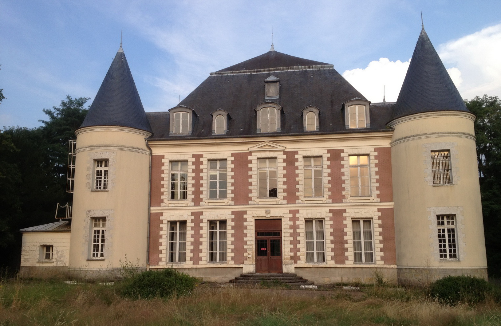 Château Corbeville façade Ouest